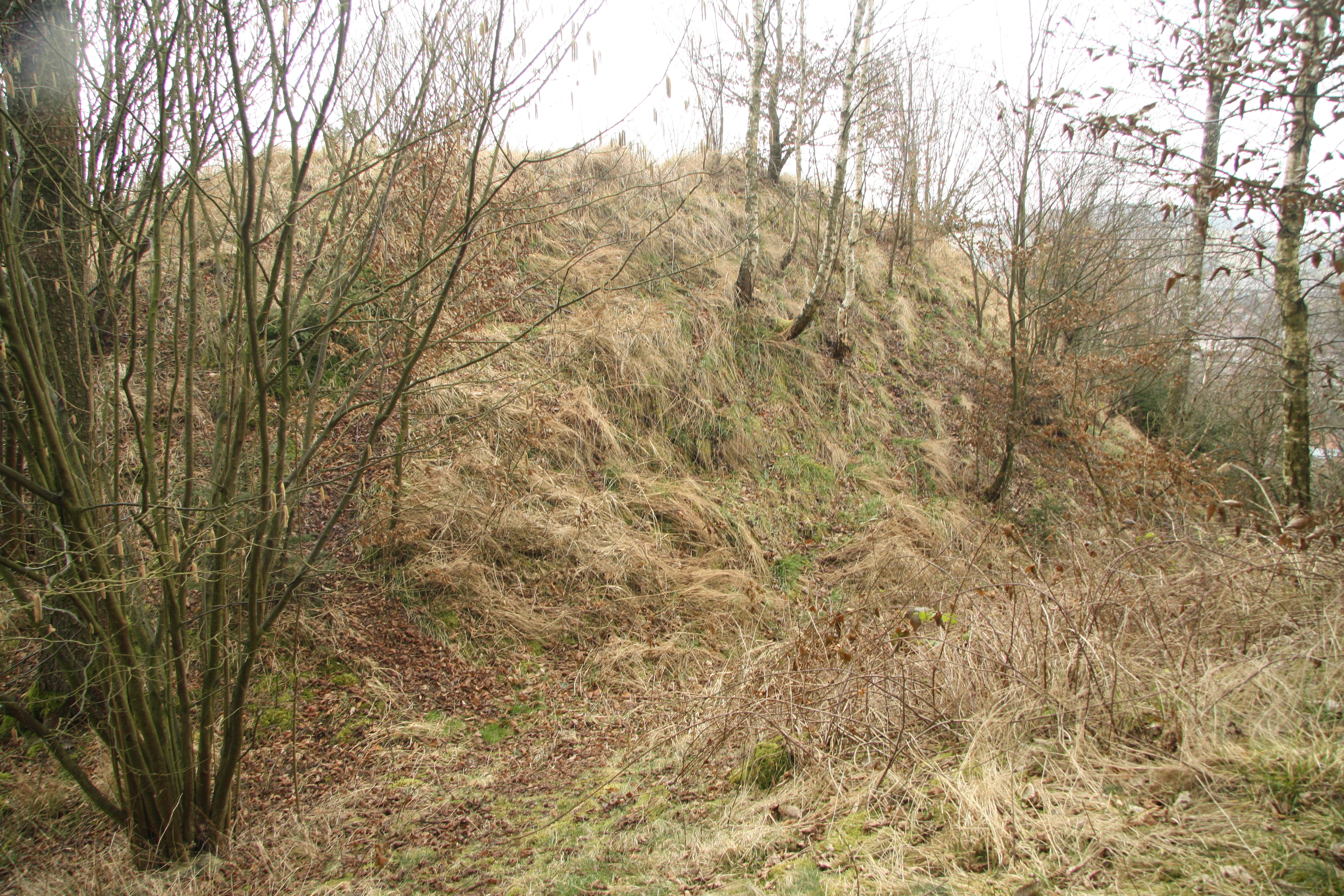 Celkový pohled na kopec tvrze Bransouze, okr. Třebíč.